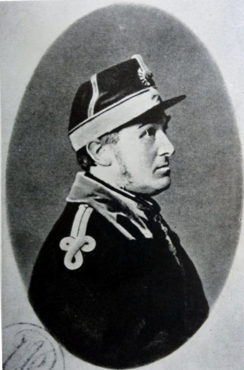 Fotografie Carol Davila - Cabinetul de Stampe al Academiei Romane din Bucuresti